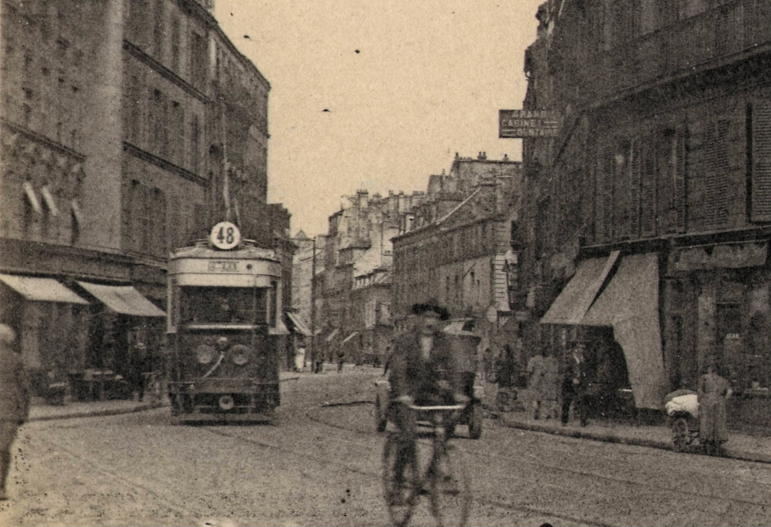 Détail de la carte postale ancienne éditée par ELD, n°1261SAINT-DENIS - Place aux Gueldres et rue de ParisGros plan sur un tramway de la STCRP (Ligne 48 : Barrage de St-Denis - Opéra. Cette ligne circulait avant la création de la STCRP sous l'indice SDs de la CGO)